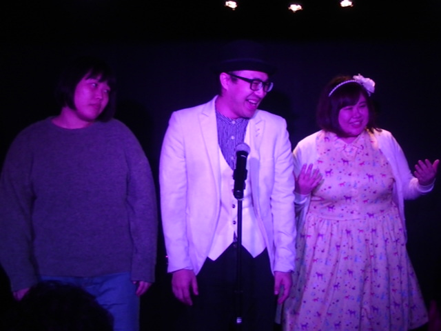 ハニートラップ (お笑いトリオ) 2018年12月